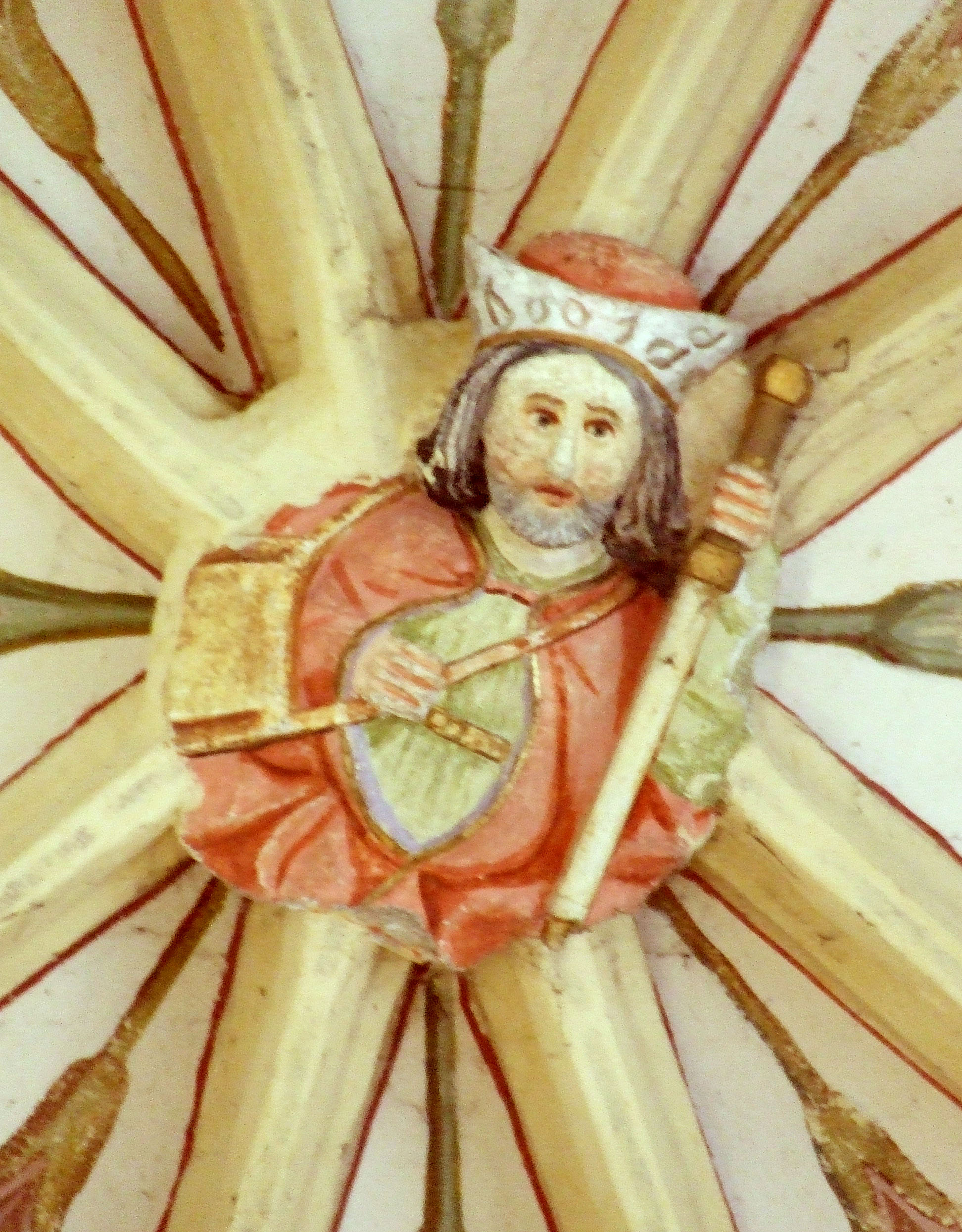 Viljem Savinjski, soprog Heme Krške, upodobljen na sklepniku oboka ž.c. Sv. Ruperta v Šentrupertu na Dolenjskem. Hema in Viljem sta bila podpornika gradnje cerkve.